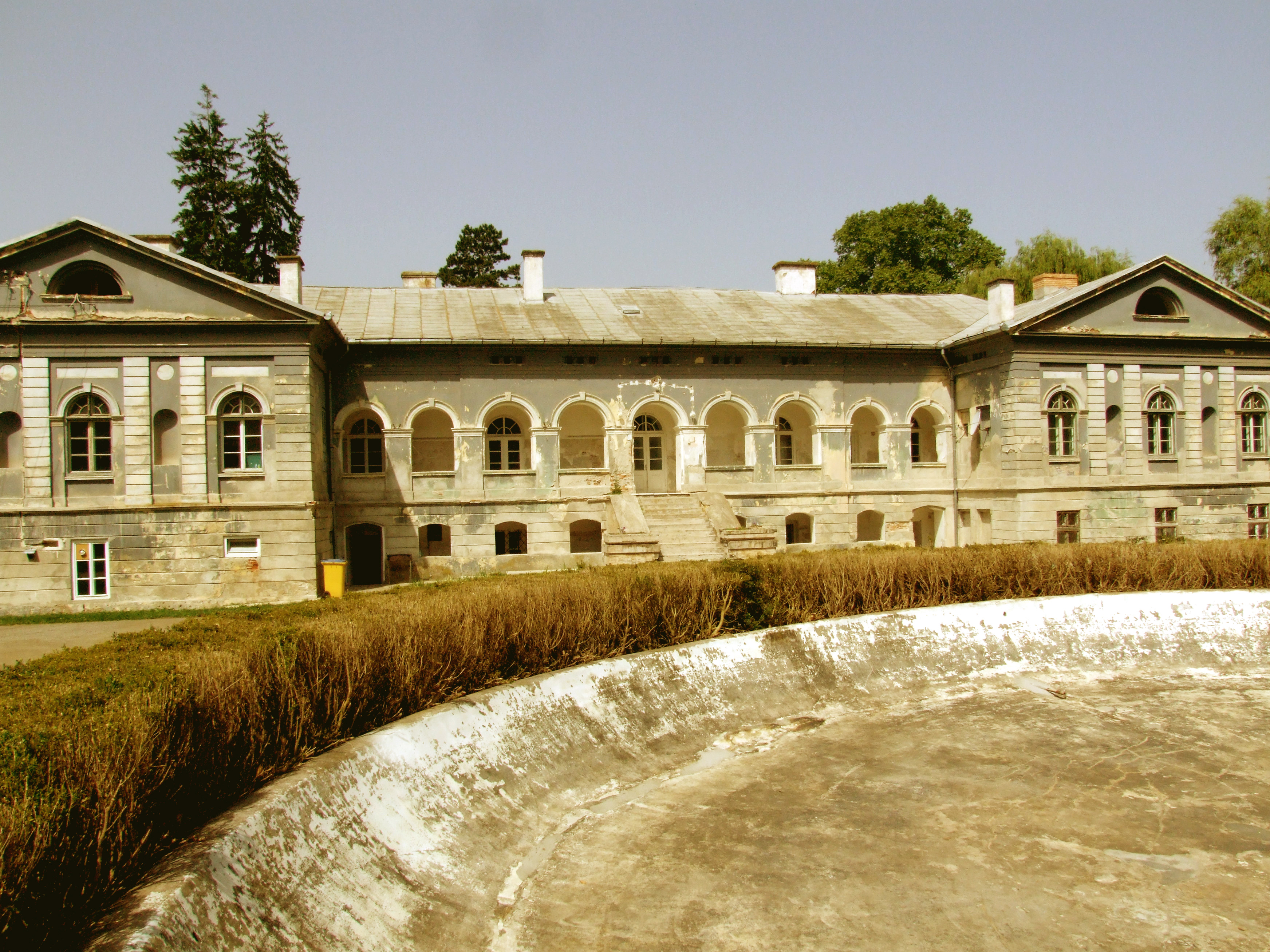 Castelul Gyulai Ferencz in comuna Mintia, satu Vetel 01